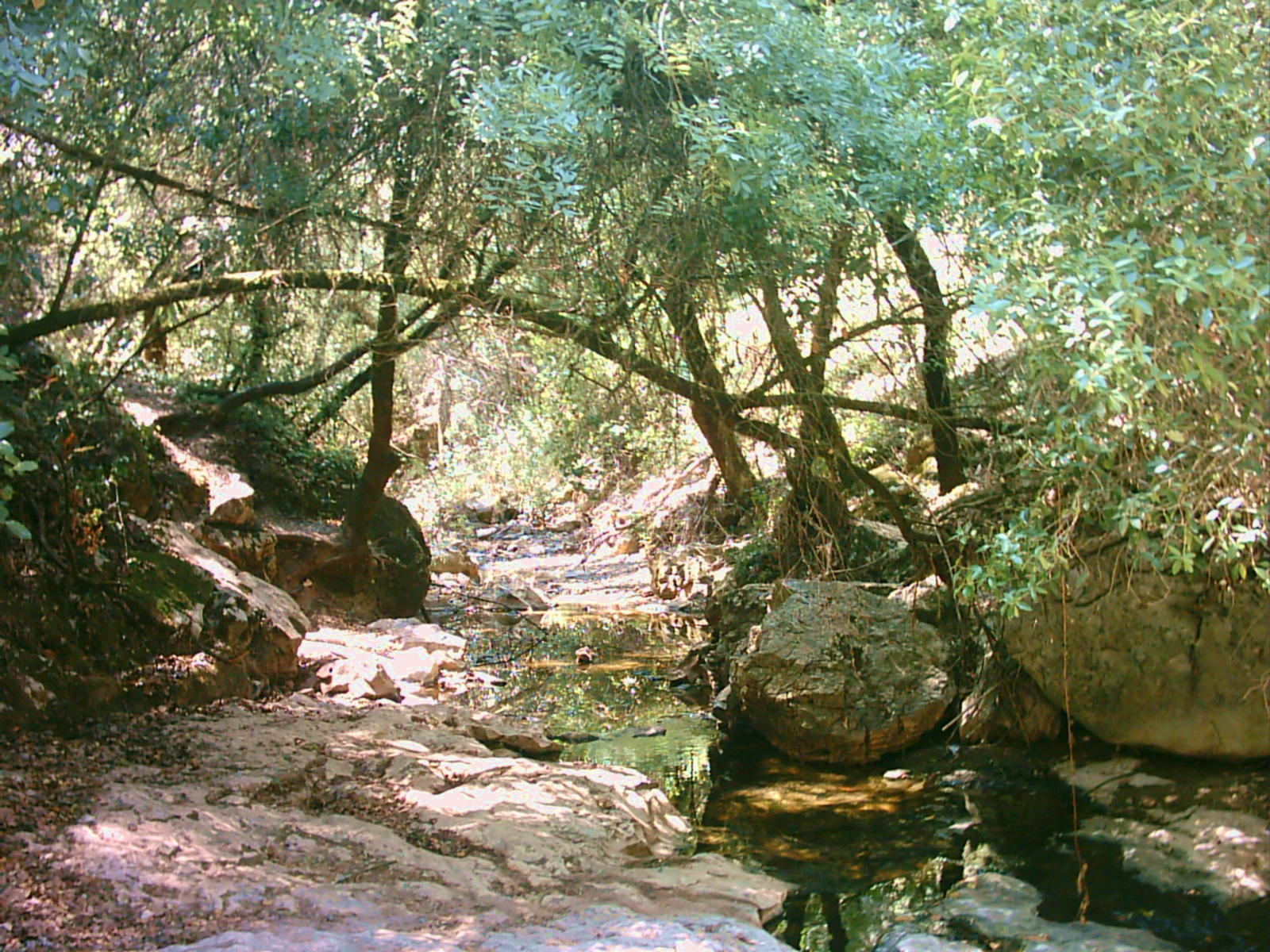 Ribeira dos Amiais, afluente do Alviela